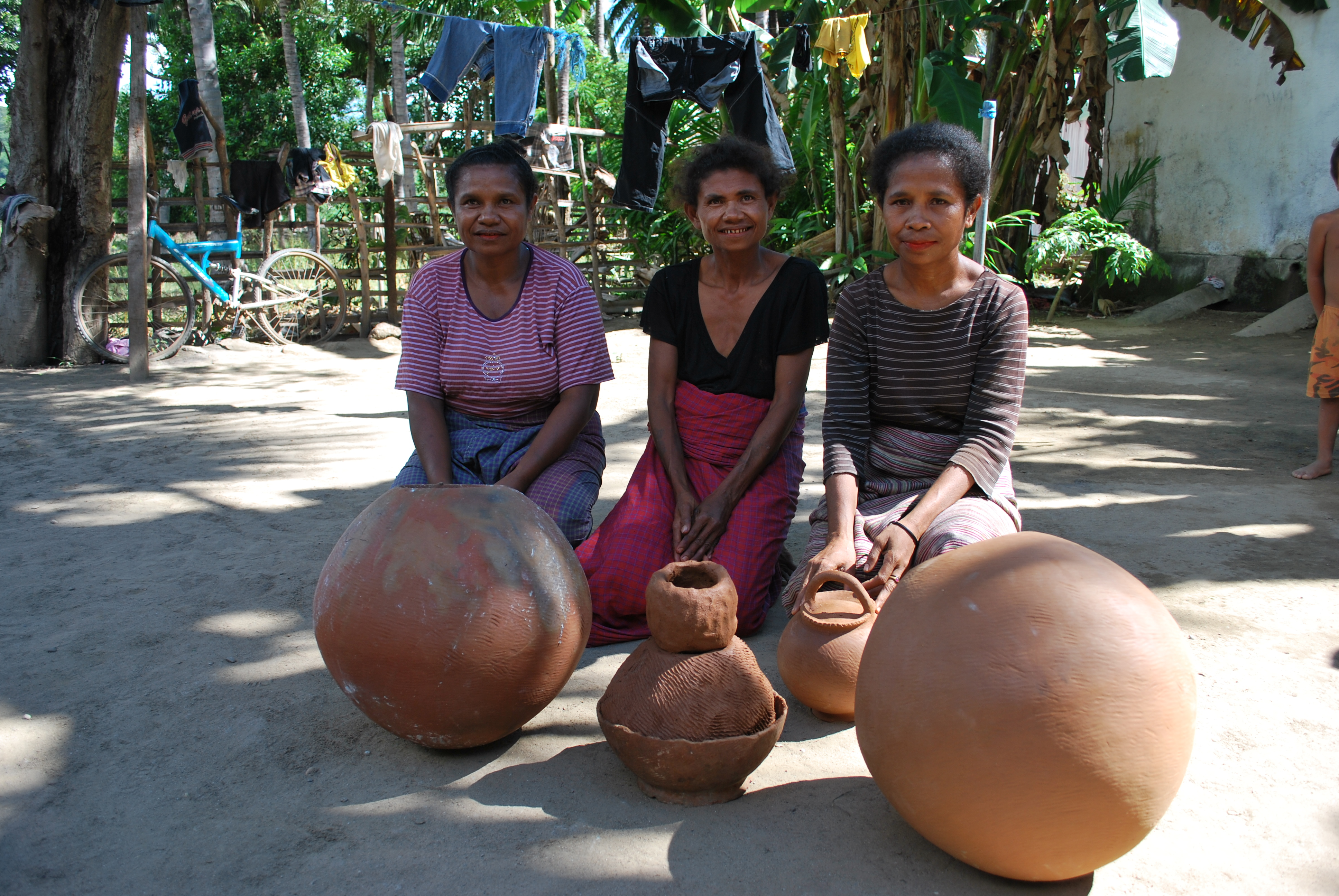 Taknebo, Lelaufe, Oecusse